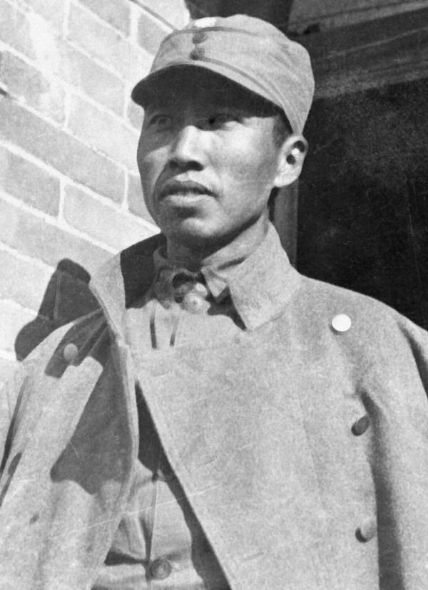 左權的照片，來自新華社